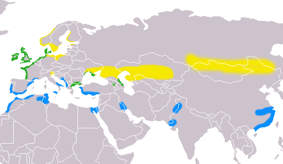 range map of Tadorna tadorna